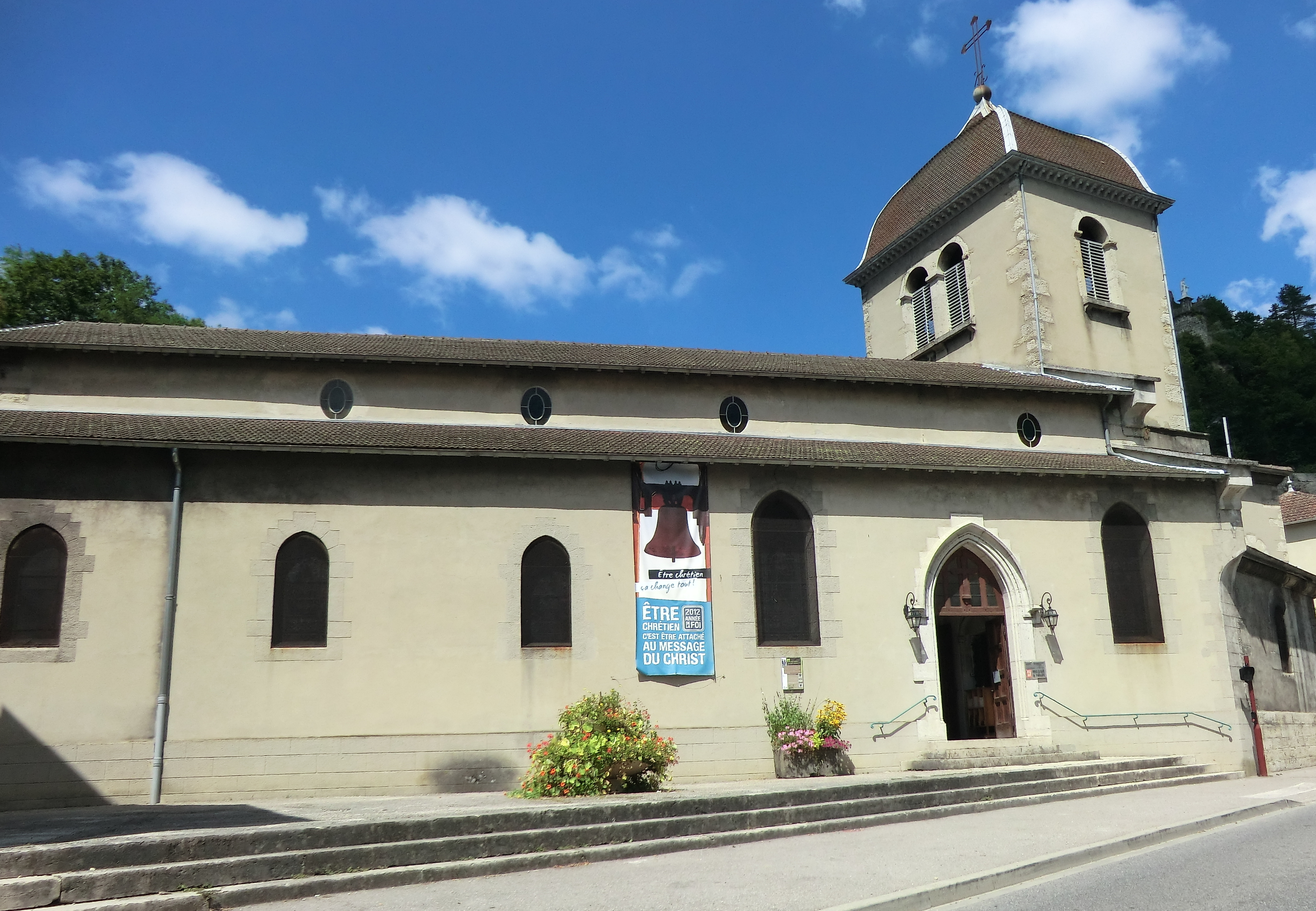 L'église Saint-Antoine de Saint-Rambert-en-Bugey.